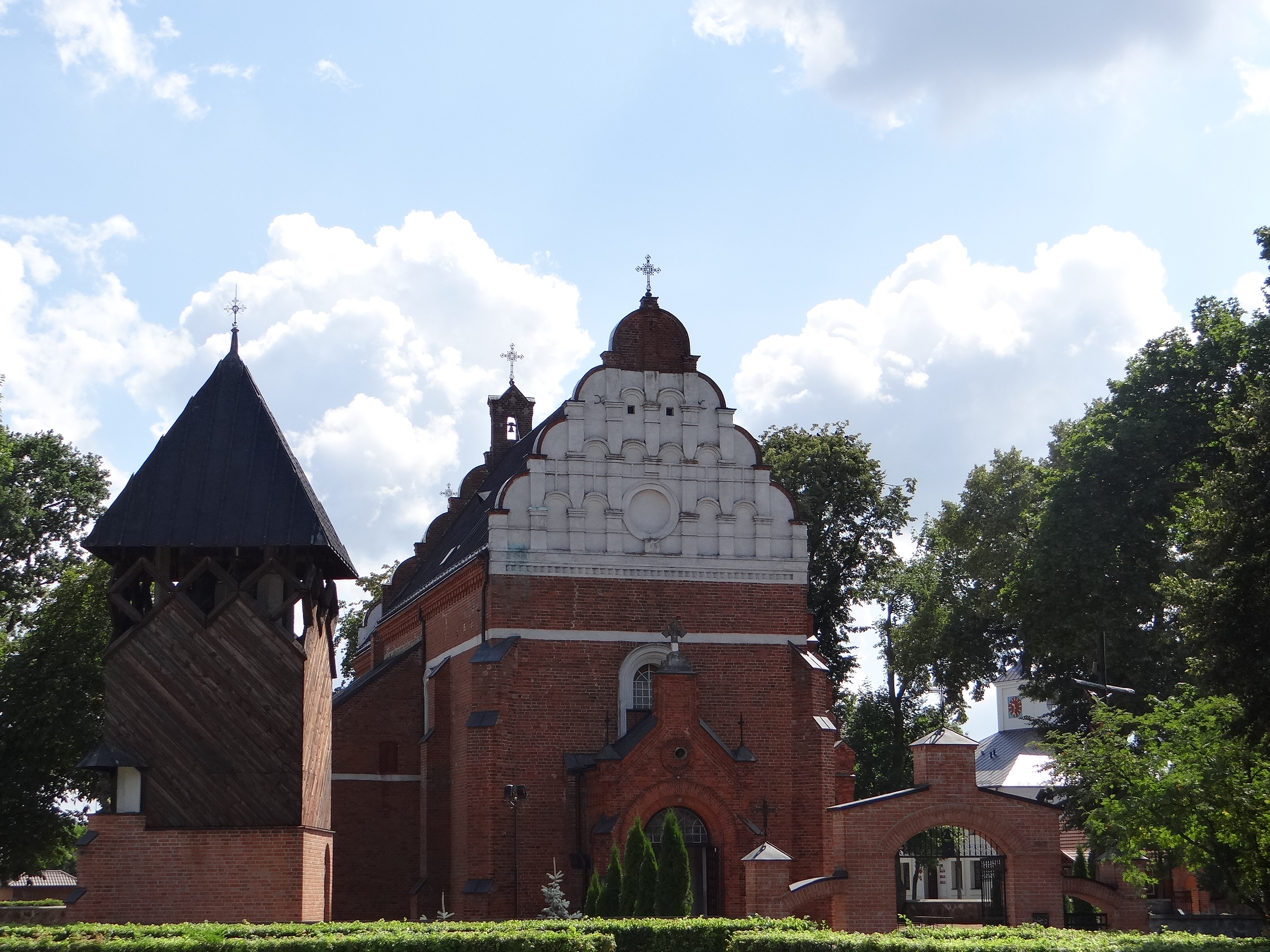 Widok od parkingu i ul. Warszawskiej